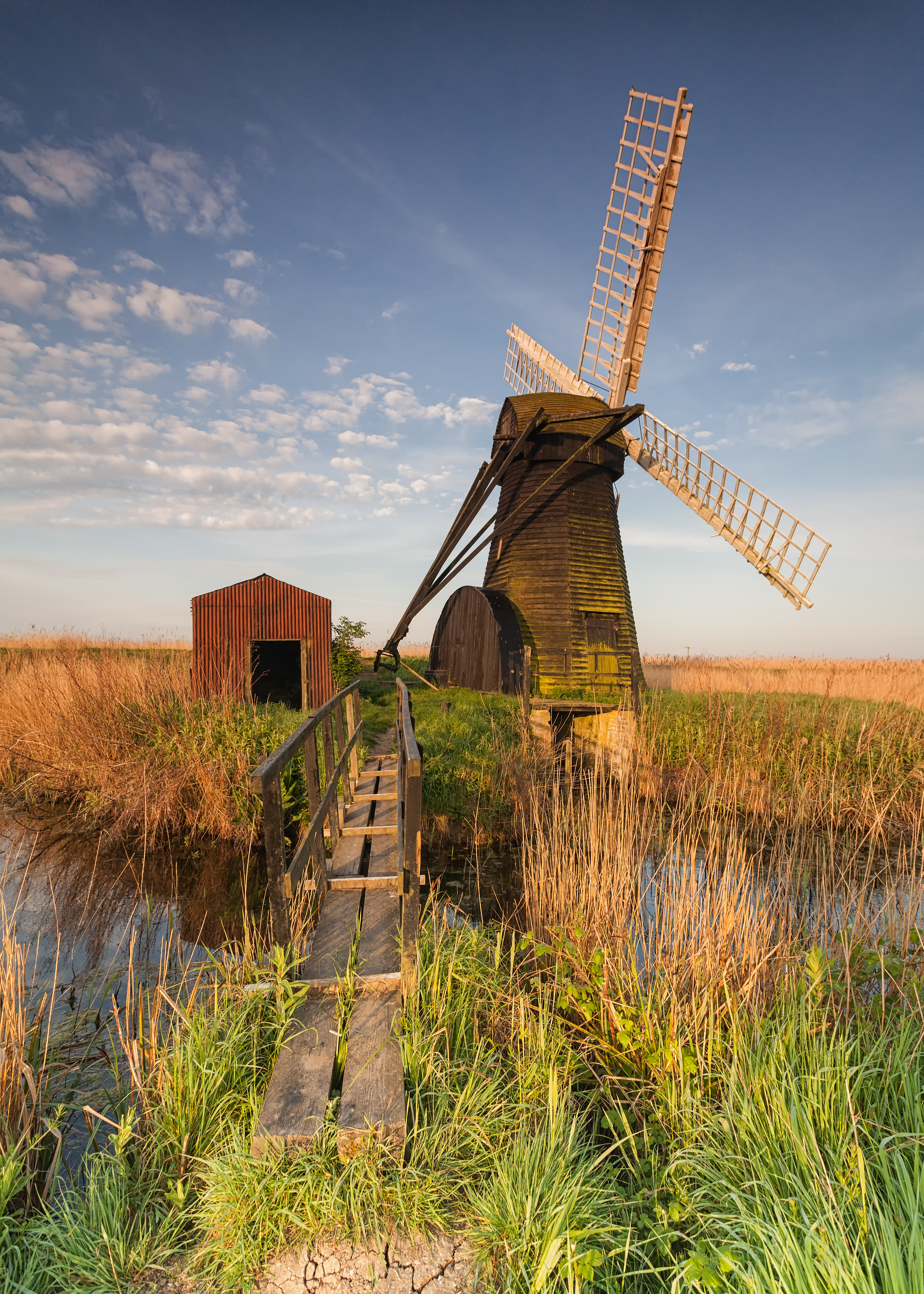 Herringfleet Windmill